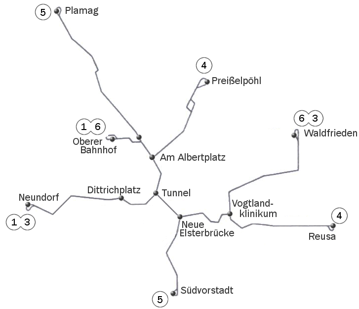 Beschreibung: Straßenbahnnetz in Plauen Quelle: selbst erstellt, 3. Juni 2005 Urheber: CrazyD Lizenzstatus: GNU FDL Description: Trammap from Plauen Source: done by myself CrazyD, 3 June 2005 Licence: GNU FDL